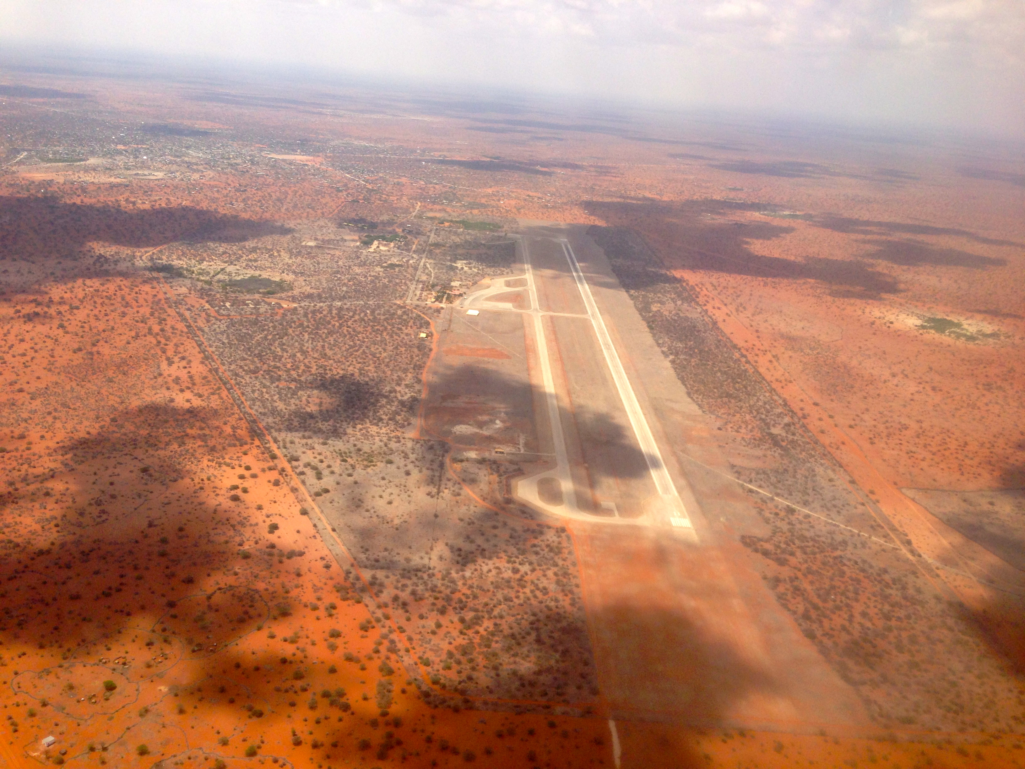 ვაჯირის აეროდრომი